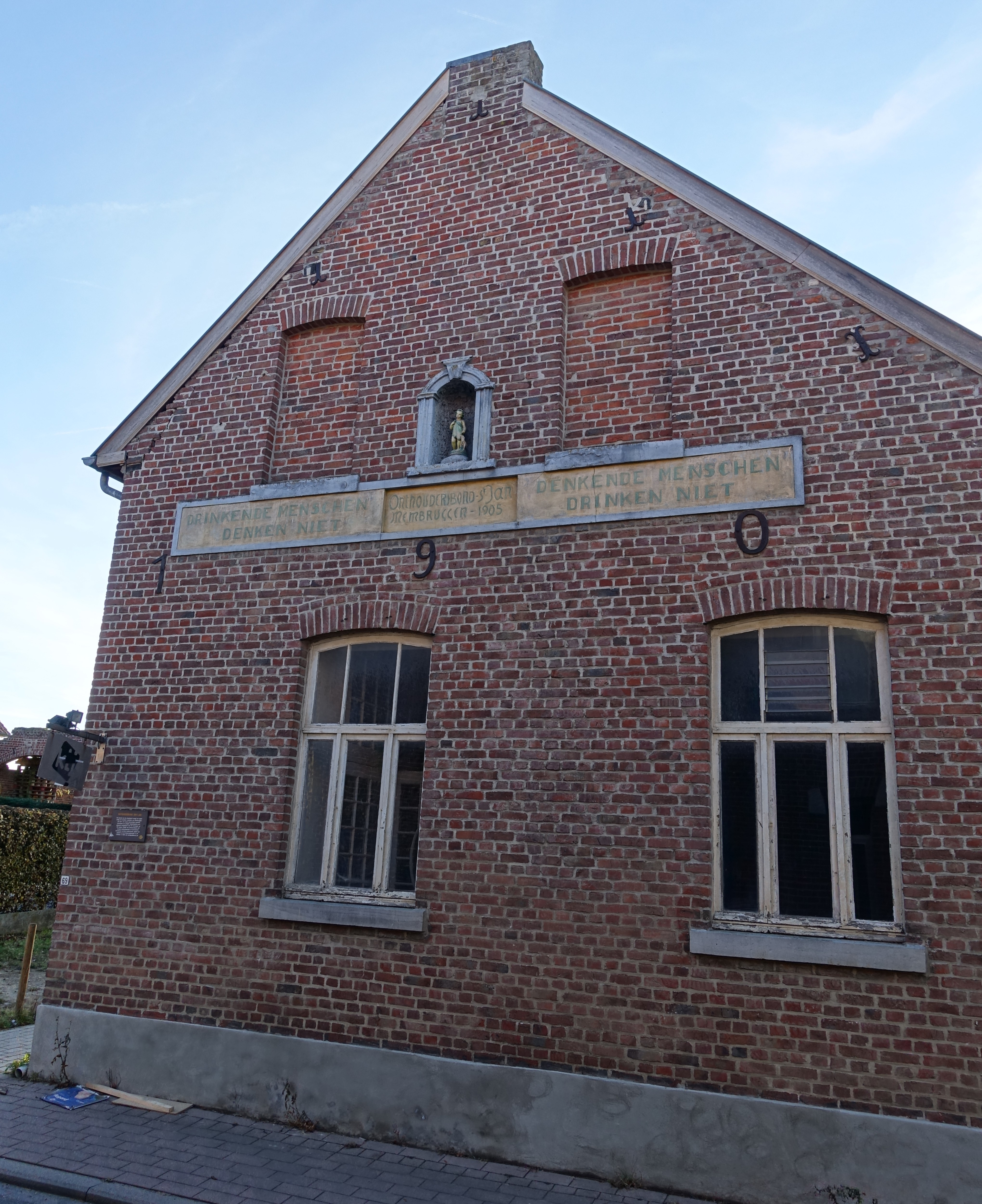 Lokaal van de Onthoudersbond in Membruggen (Riemst) met De straatgevel draagt het opschrift : DRINKENDE MENSCHEN/ DENKEN NIET/ DENKENDE MENSCHEN/ DRINKEN NIET/ ONTHOUDERSBOND ST. JAN/ MEMBRUGGEN 1905. Verbouwd in 1907. Erfgoed 36935 This photo of immovable heritage has been taken in the Flemish Region